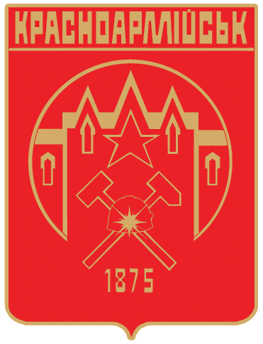 Герб м. Красноармійськ